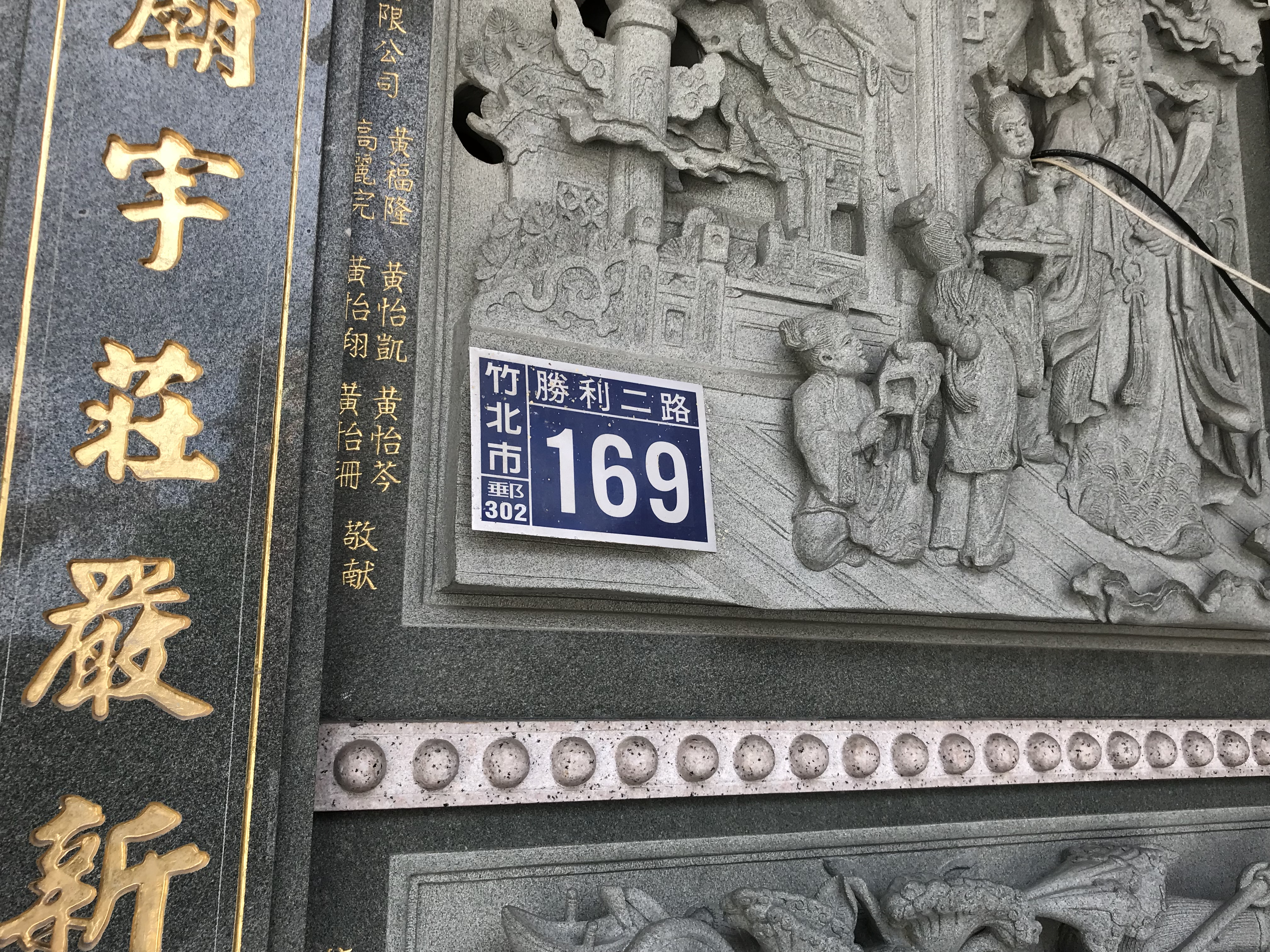 竹北伍福宮門牌